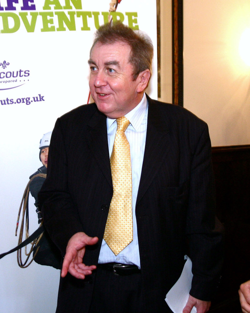 Adrian Sanders MP